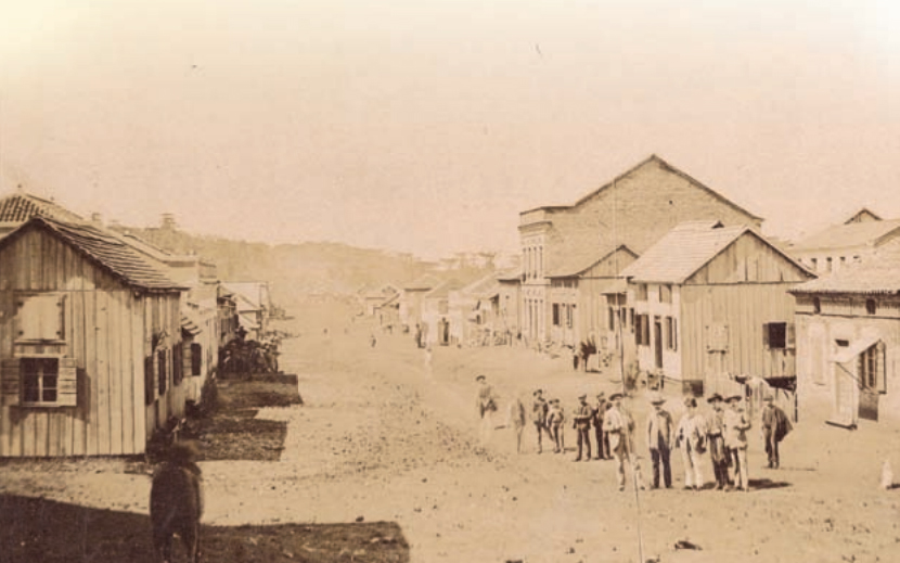 Avenida Júlio de Castilhos entre 1875 e 1890, então conhecida como Rua Silveira Martins ou Rua Grande.